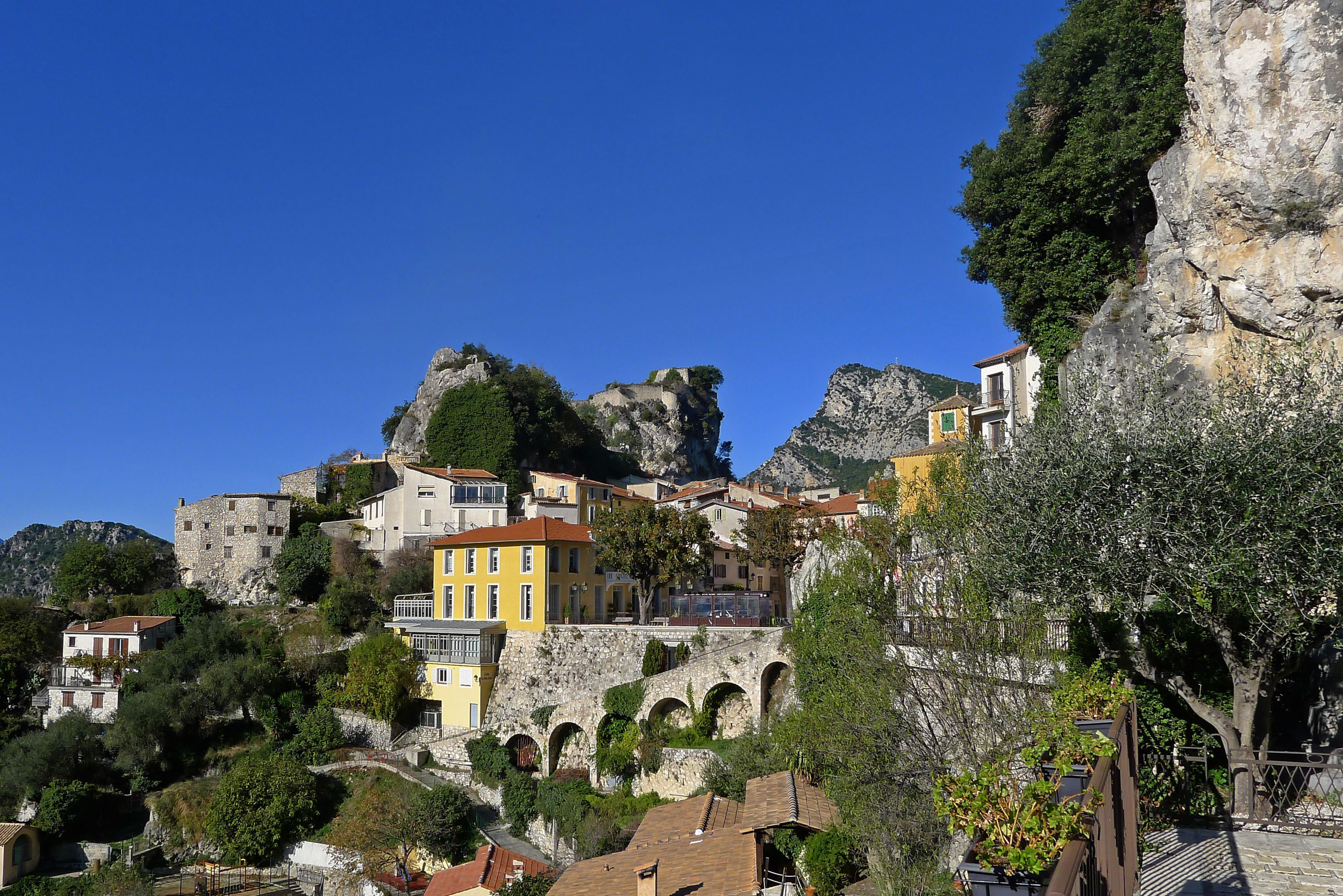 Vue sur le village de Gilette en venant du pont Charles-Albert